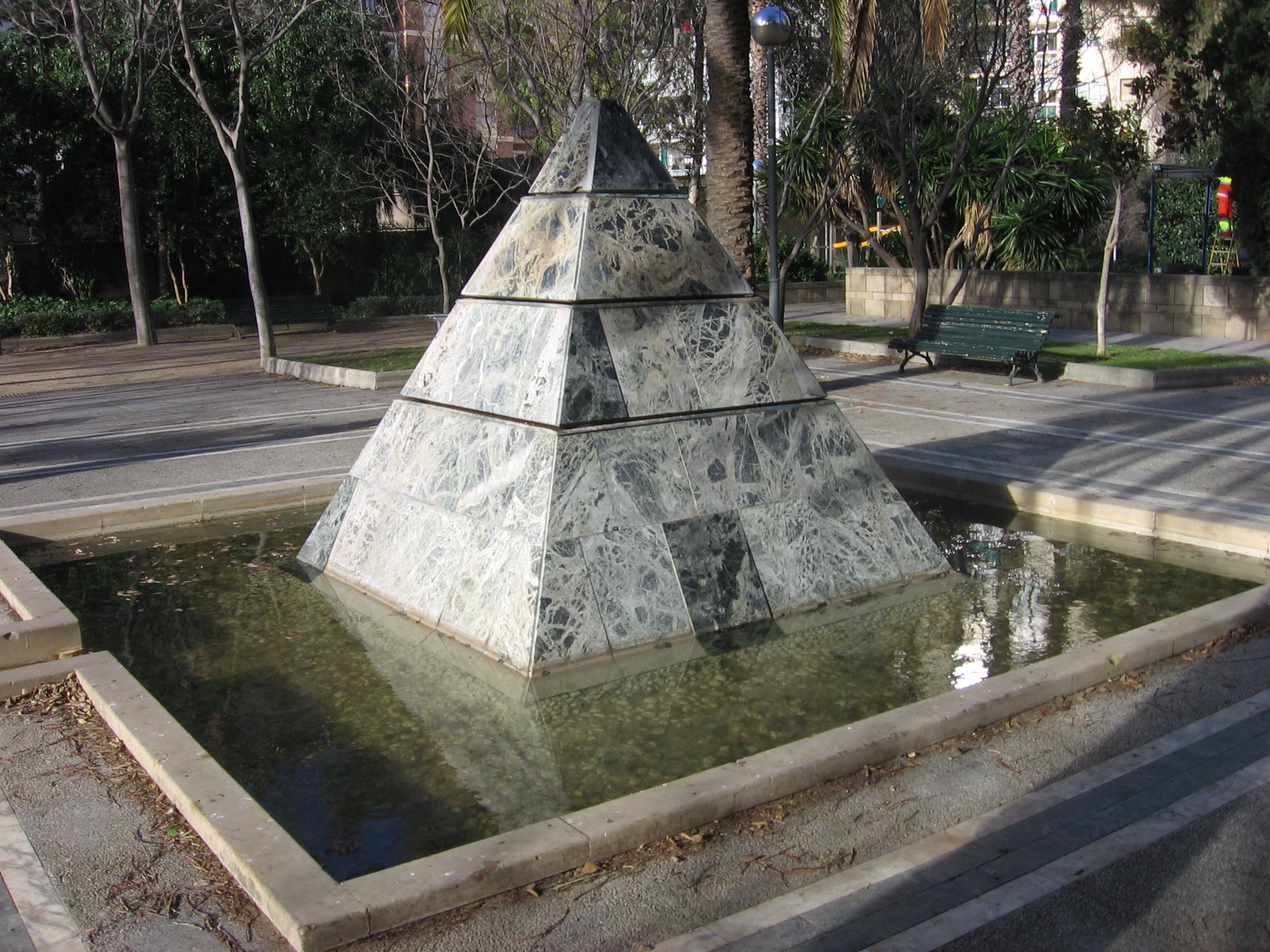 Parque de Can Sabaté.